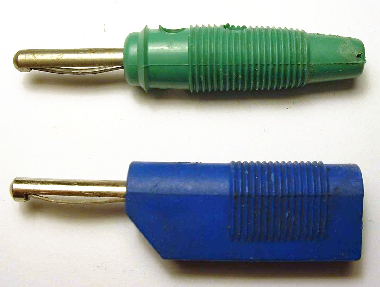 verschiedene Bananenstecker -- some banana connectors